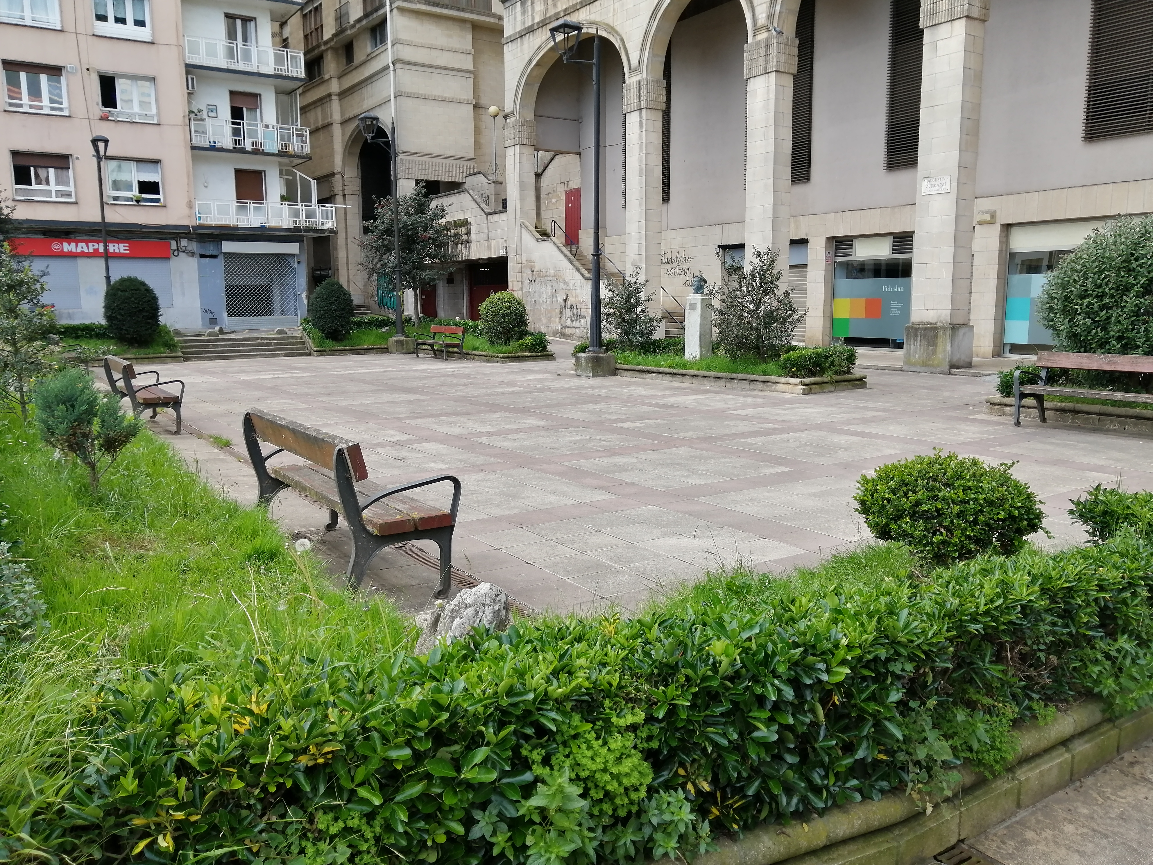 Augustin Zubikarai enparantza, Ondarroa